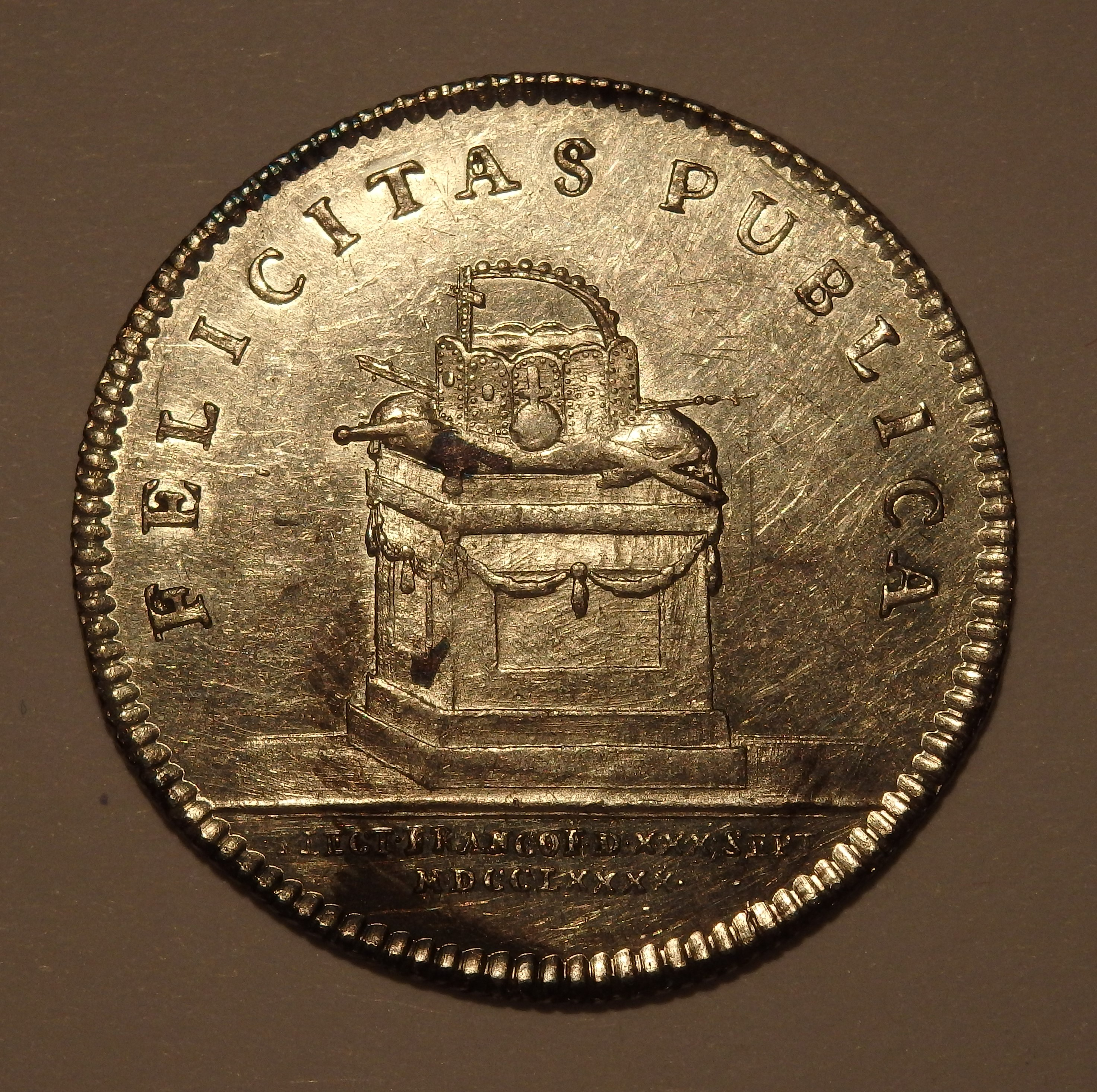 Silberabschlag 2 Dukaten, 1790, auf die Wahl Leopolds II., Schön, Deutscher Münzkatalog, 18. Jh., Frankfurt, Nr. 101